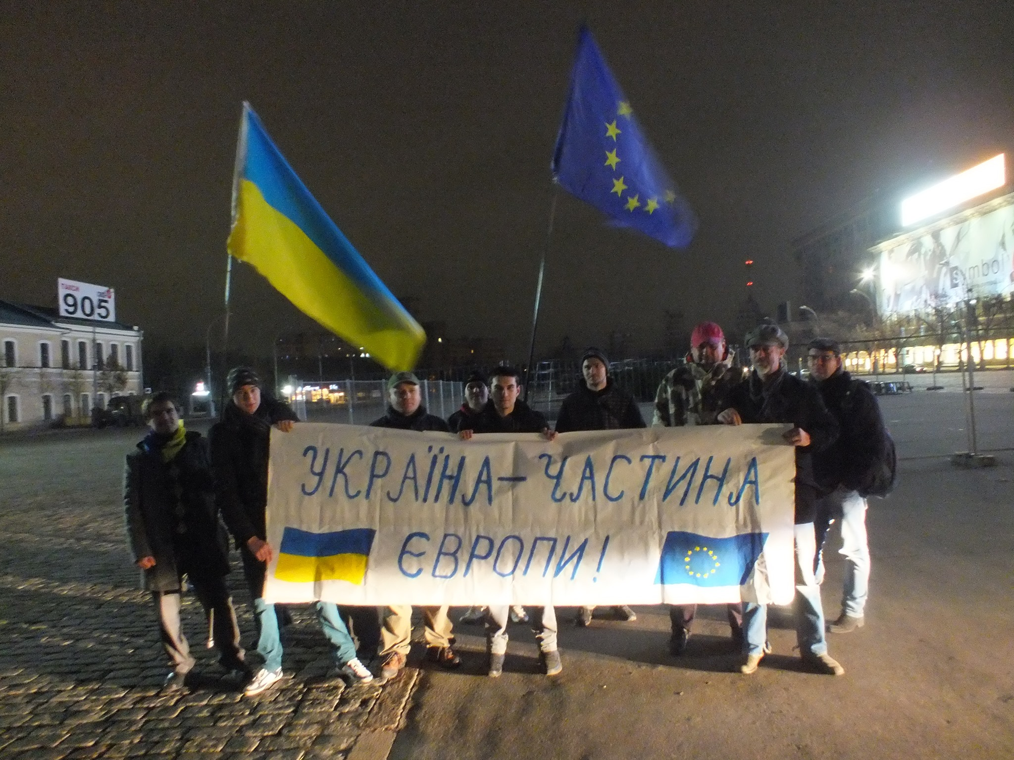 Початок Революції Гідності в Харкові. Ніч з 21 на 22 листопада.